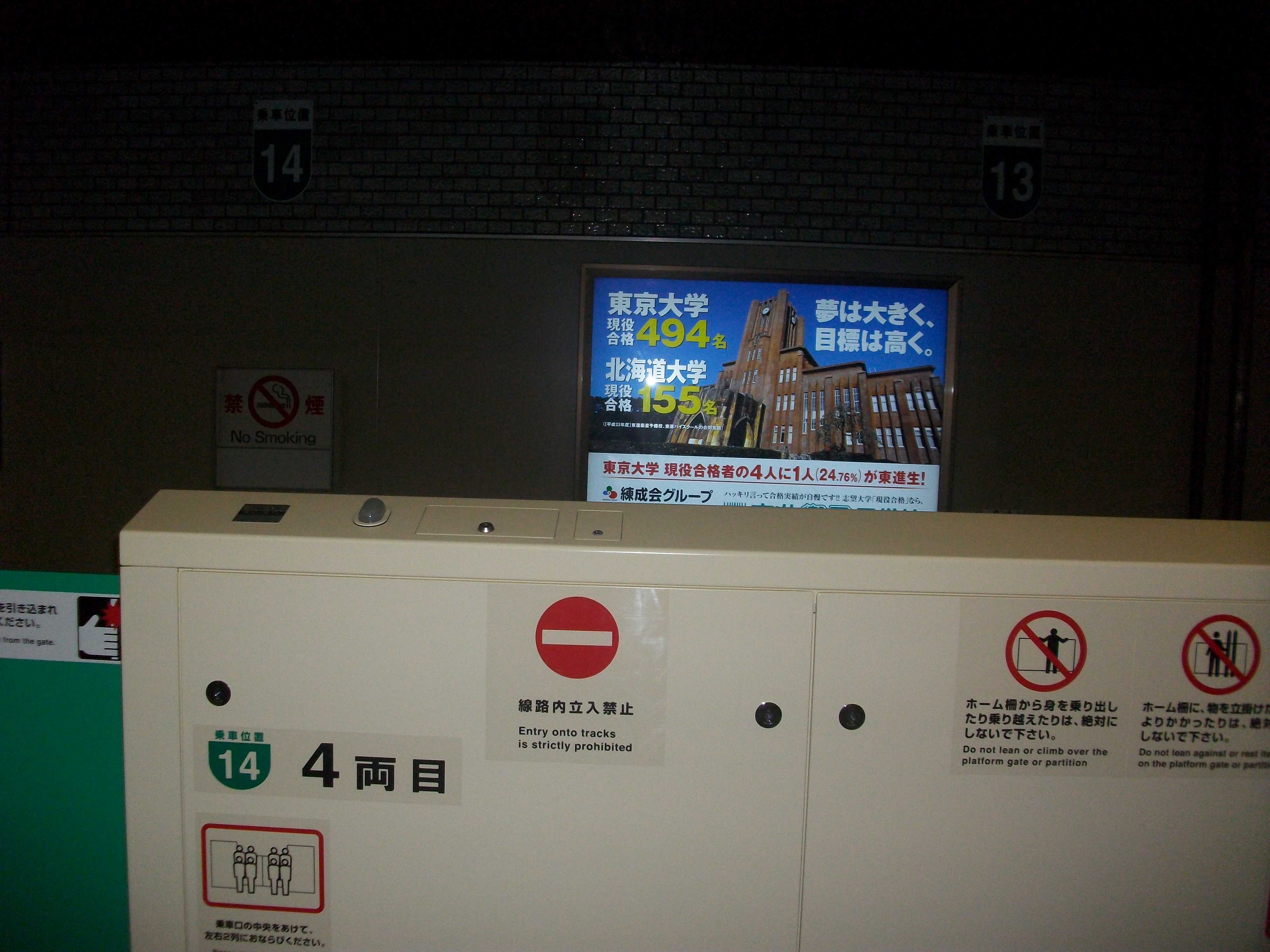 札幌市営地下鉄南北線の青色の乗車口撤去後の写真。下の標識は撤去された。